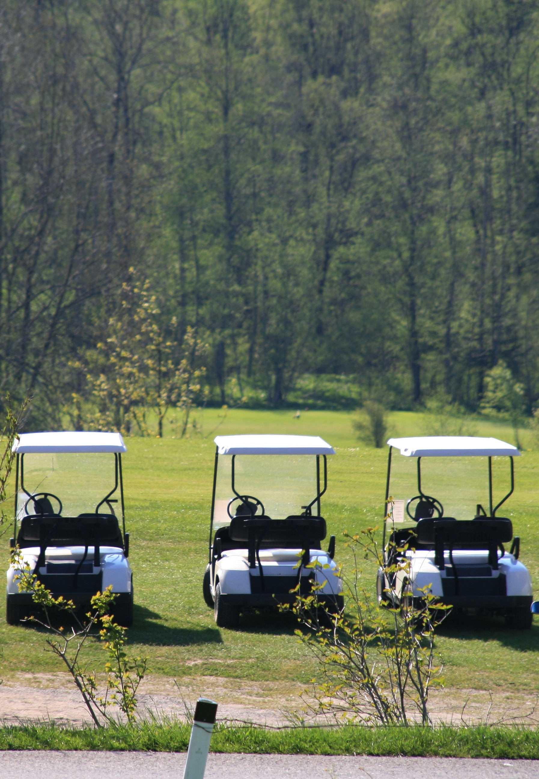 Golf cart´s in der Unterlitten am Riefensberg, Vorarlberg.